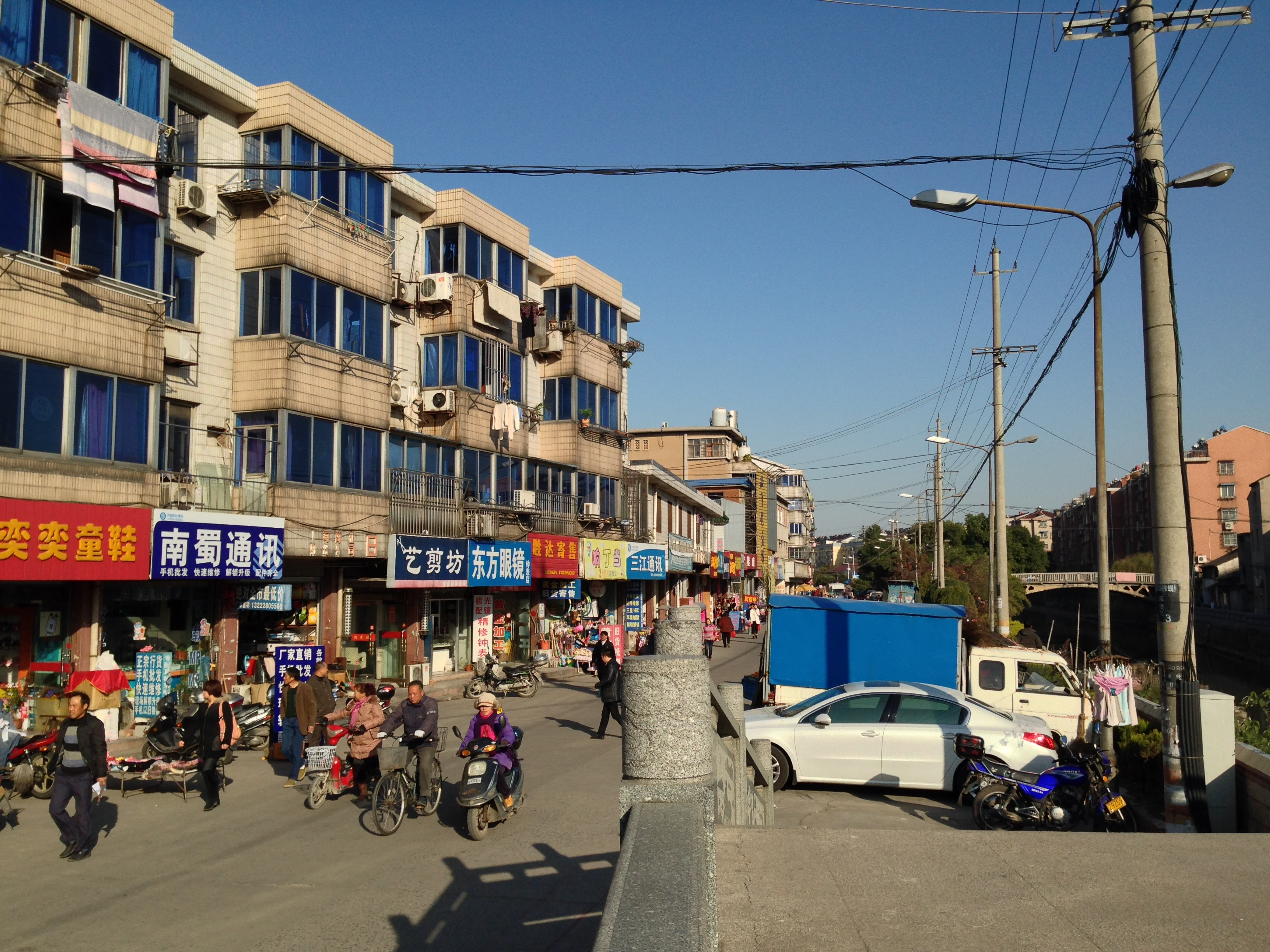 江苏省无锡市宜兴市丁蜀镇解放东路